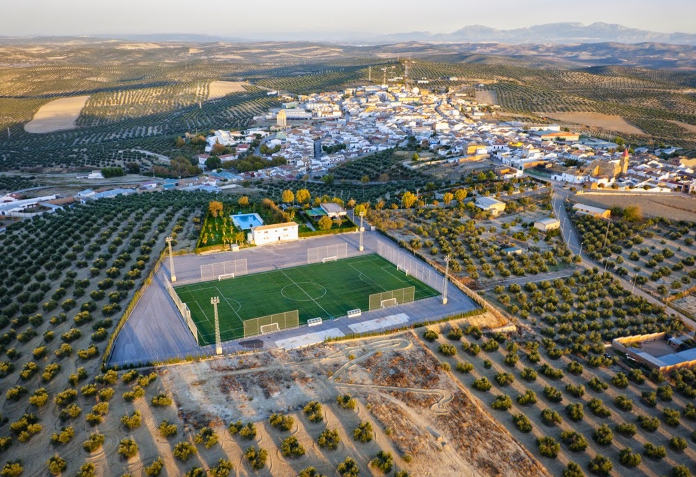 Lahiguera a vista de águila. Foto cedida por cortesía de Juan José Mercado Gavilán para ser publicada libremente.